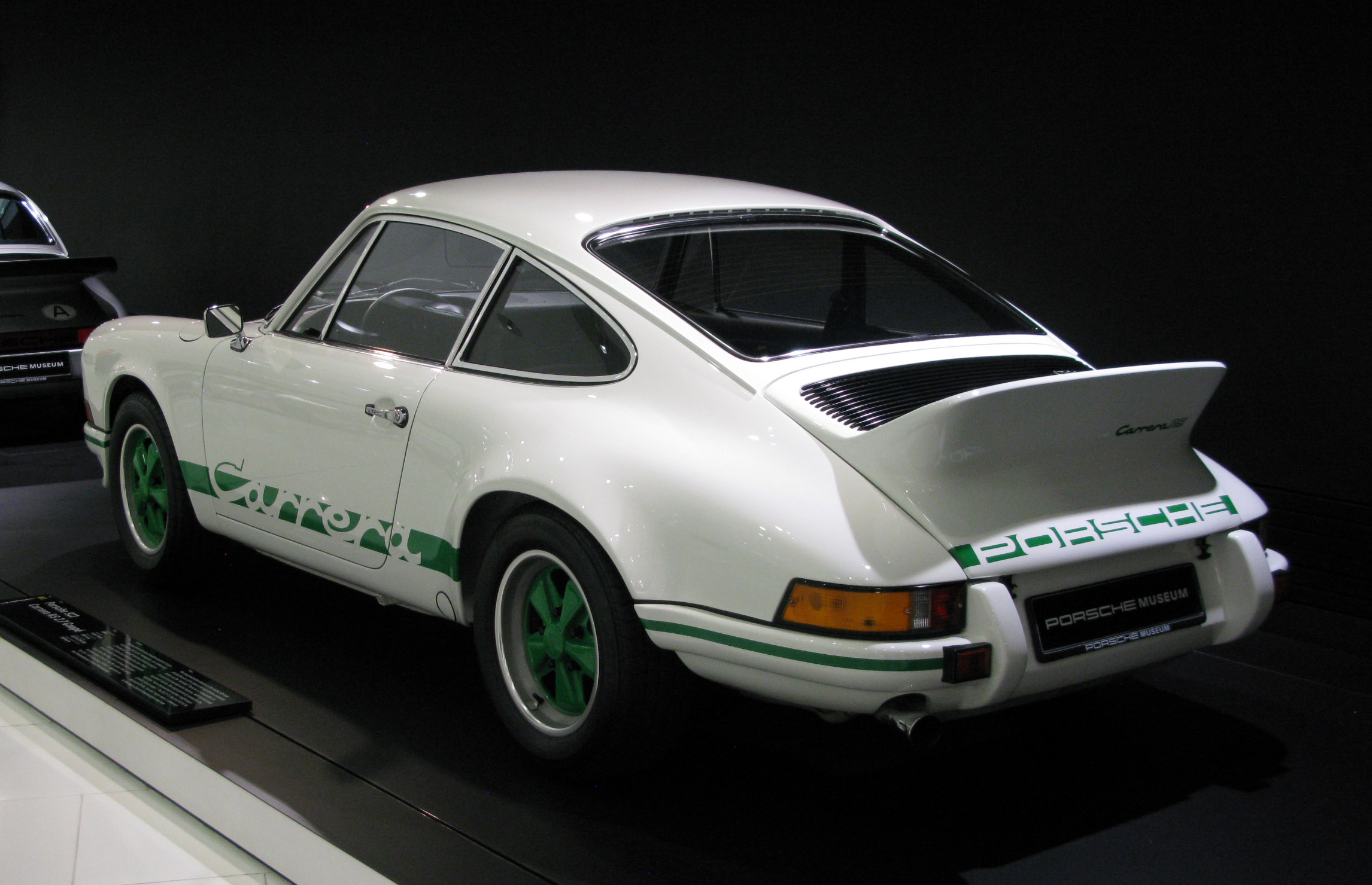 Porsche 911 Carrera RS 2.7